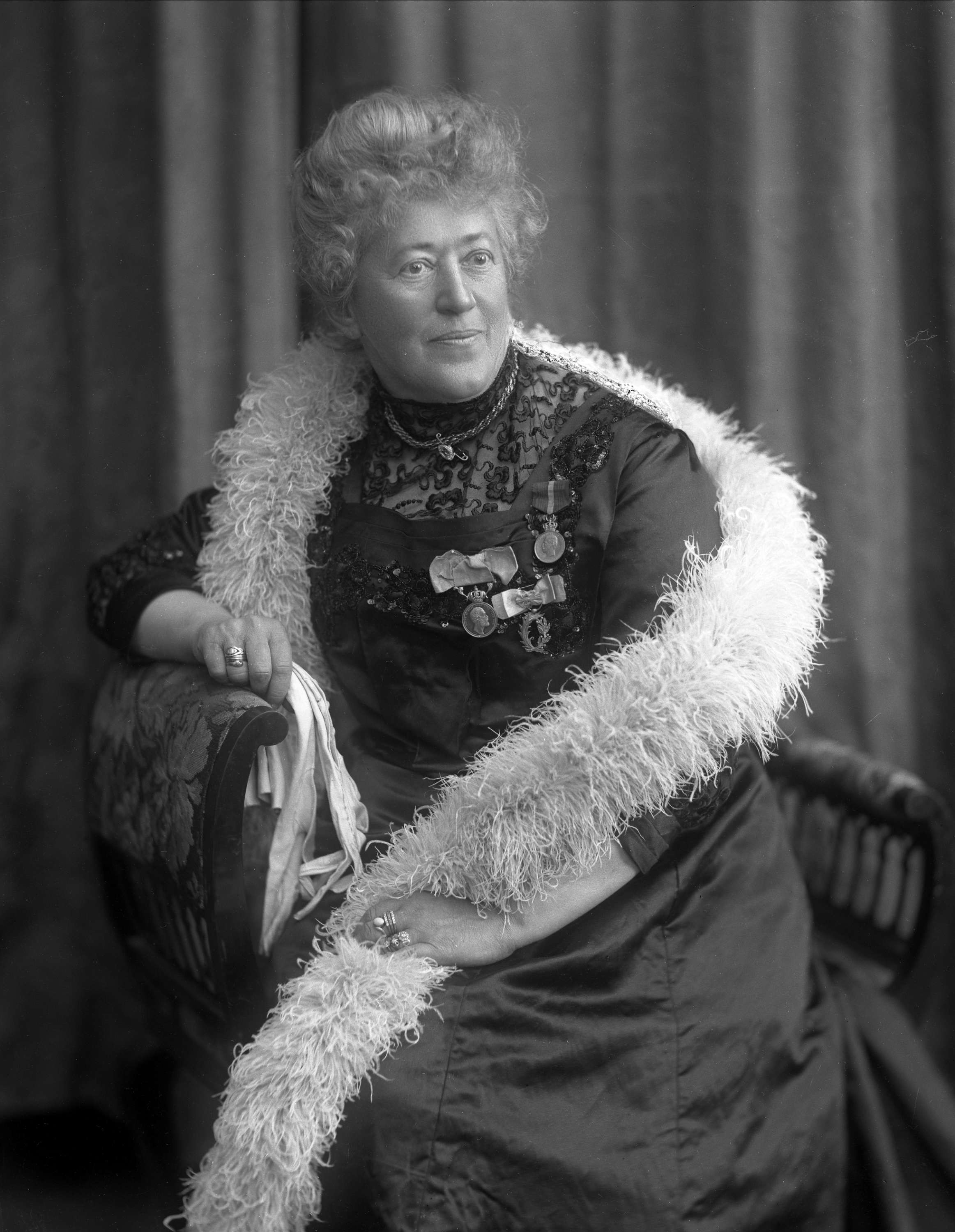 Clara Tschudi (1856-1943) var en norsk forfatter. Hun skrev meget populære biografiske skildringer om blant annet keiserinne Eugenie, Marie Antoinette, keiserinne Elisabeth, Napoleons og Goethes mødre, og om kongehus i Europa.